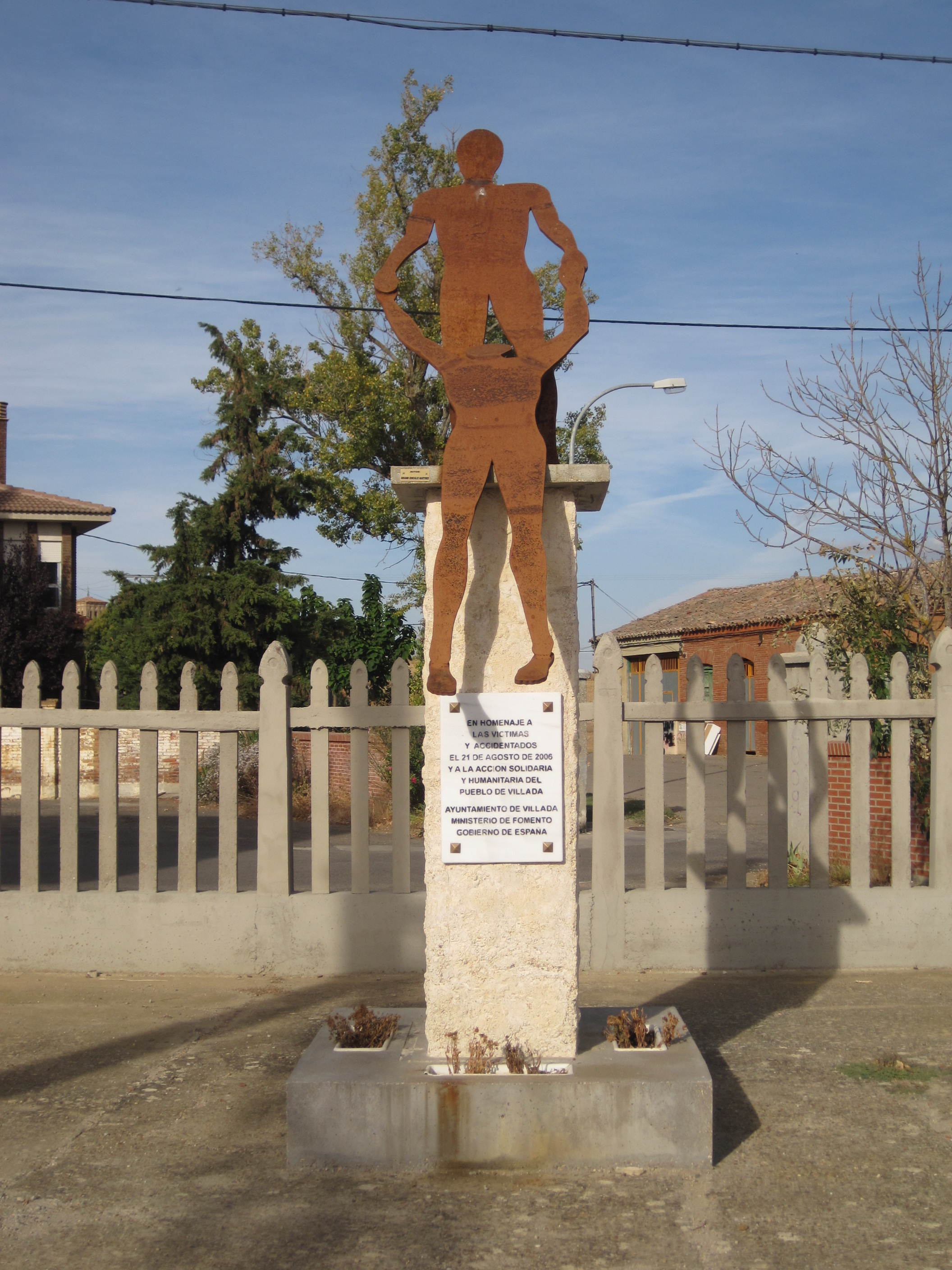 Monumento en conmemoración del accidente ferroviario de 2006 en Villada (Palencia, España).